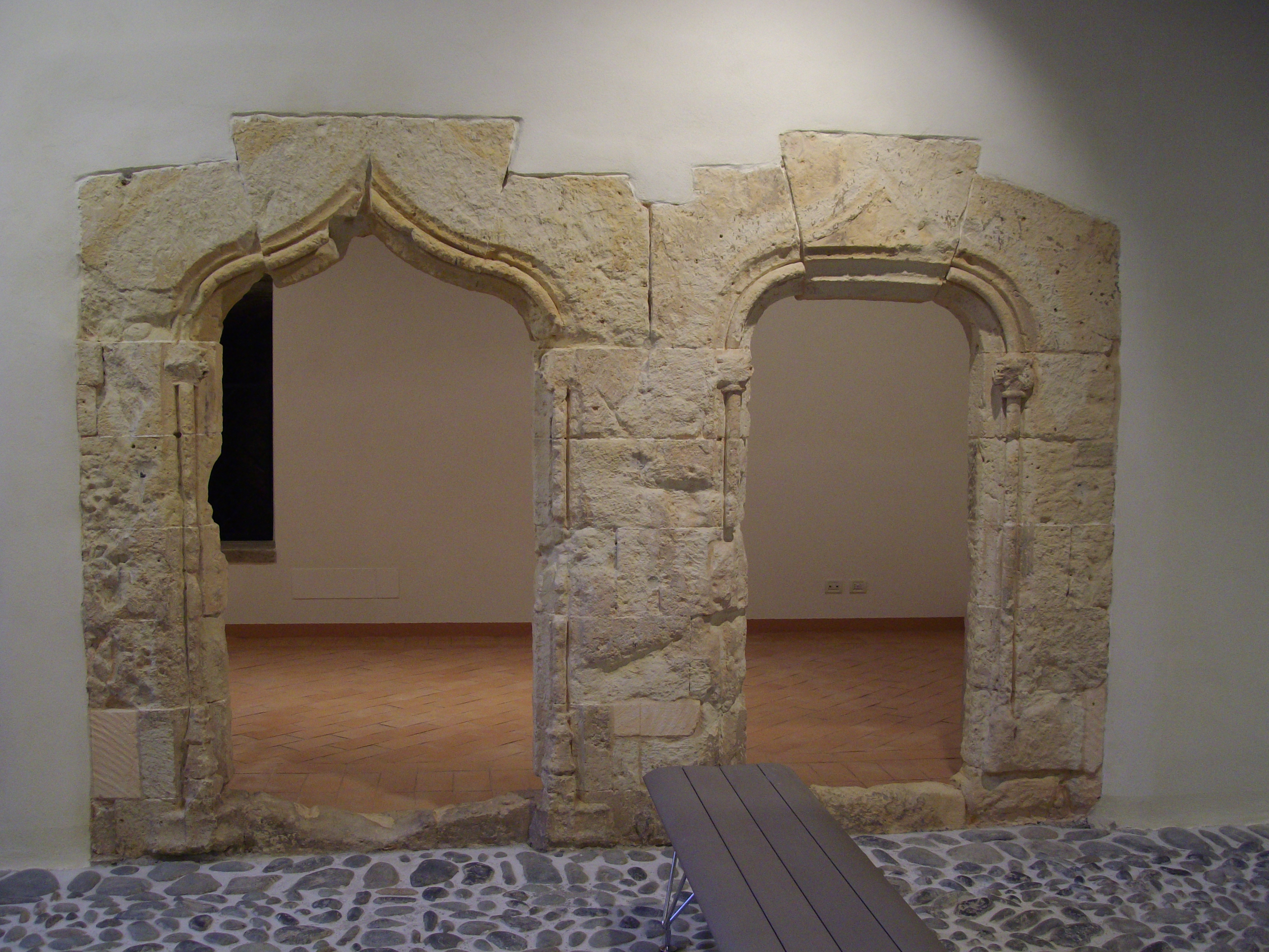 Interno dell'ex palazzo Civico di Cagliari